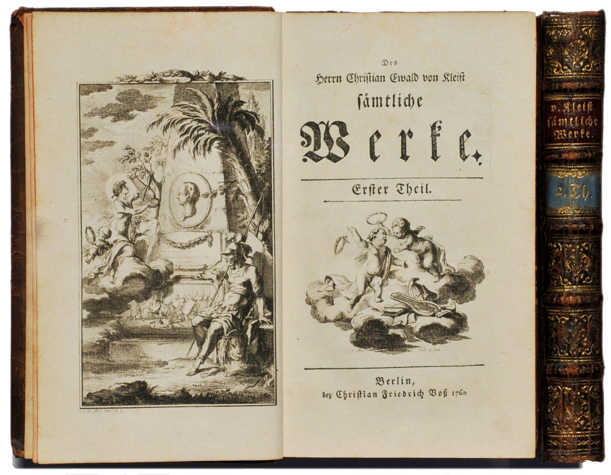 Kleist, Christian Ewald von: Sämtliche Werke. Hrsg. von K. W. Ramler 1760, 2 Bde. (Wilpert/Gühring² 9) Das radierte Frontispiz stammt von Johann Wilhelm Meil (1733 - 1805), Lit.: THIEME-BECKER XXIV,341. Der Dichter Ewald Christian von Kleist (geb. 07.03.1715) fiel als preußischer Offizier im Siebenjährigen Krieg (Schlacht bei Kunersdorf am 12.08.1759). Er ist der Adressat der von LESSING verfassten "Briefe, die neueste Litteratur betreffend" (1759 - 65, 23 Tle.) und das Vorbild für die Figur des Tellheim in "Minna von Barnhelm" (Quelle: Brockhaus 21. Auf. (2006), Bd. 15, S. 146).